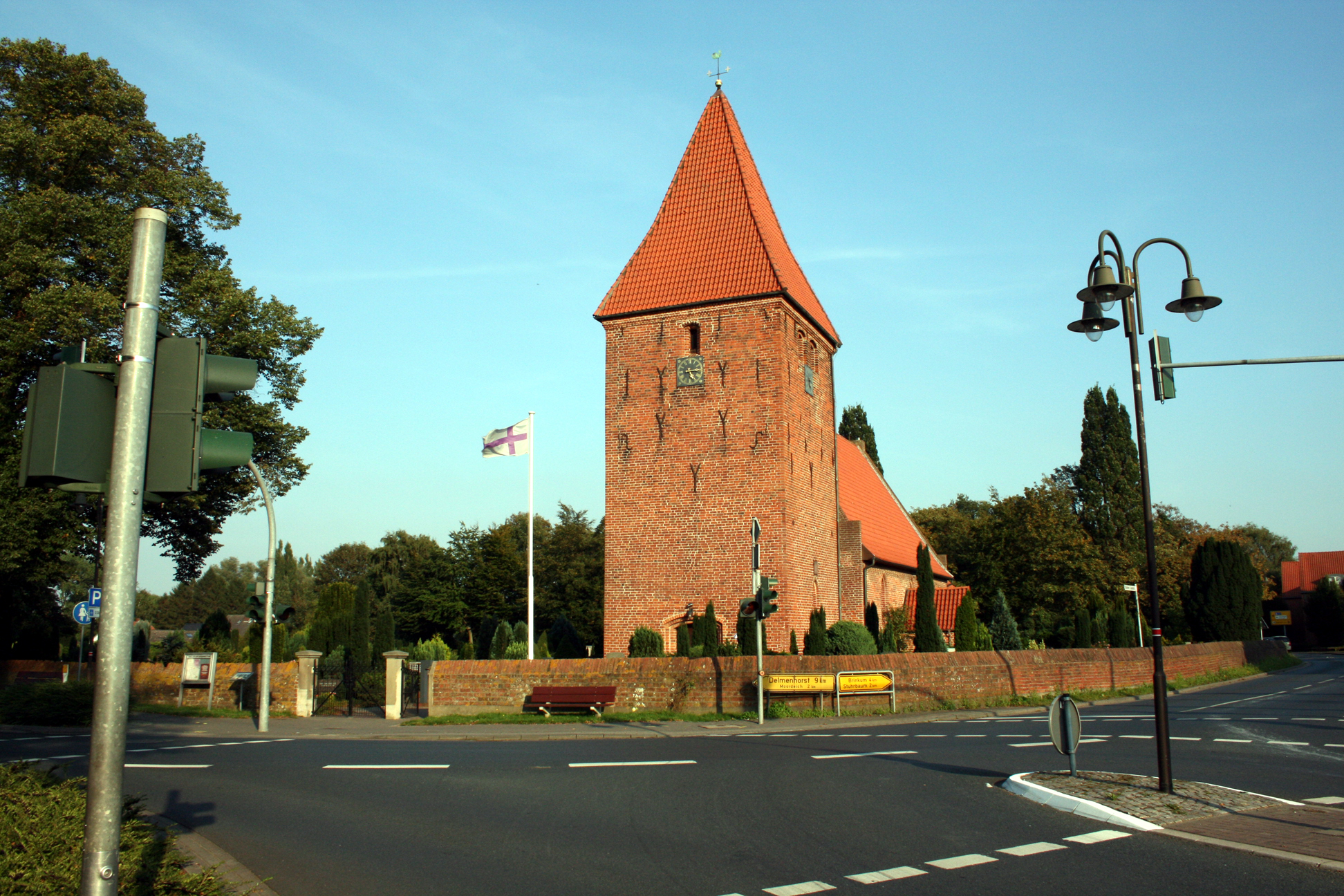 Backsteinkirche in Stuhr aus dem 13. Jahrhundert